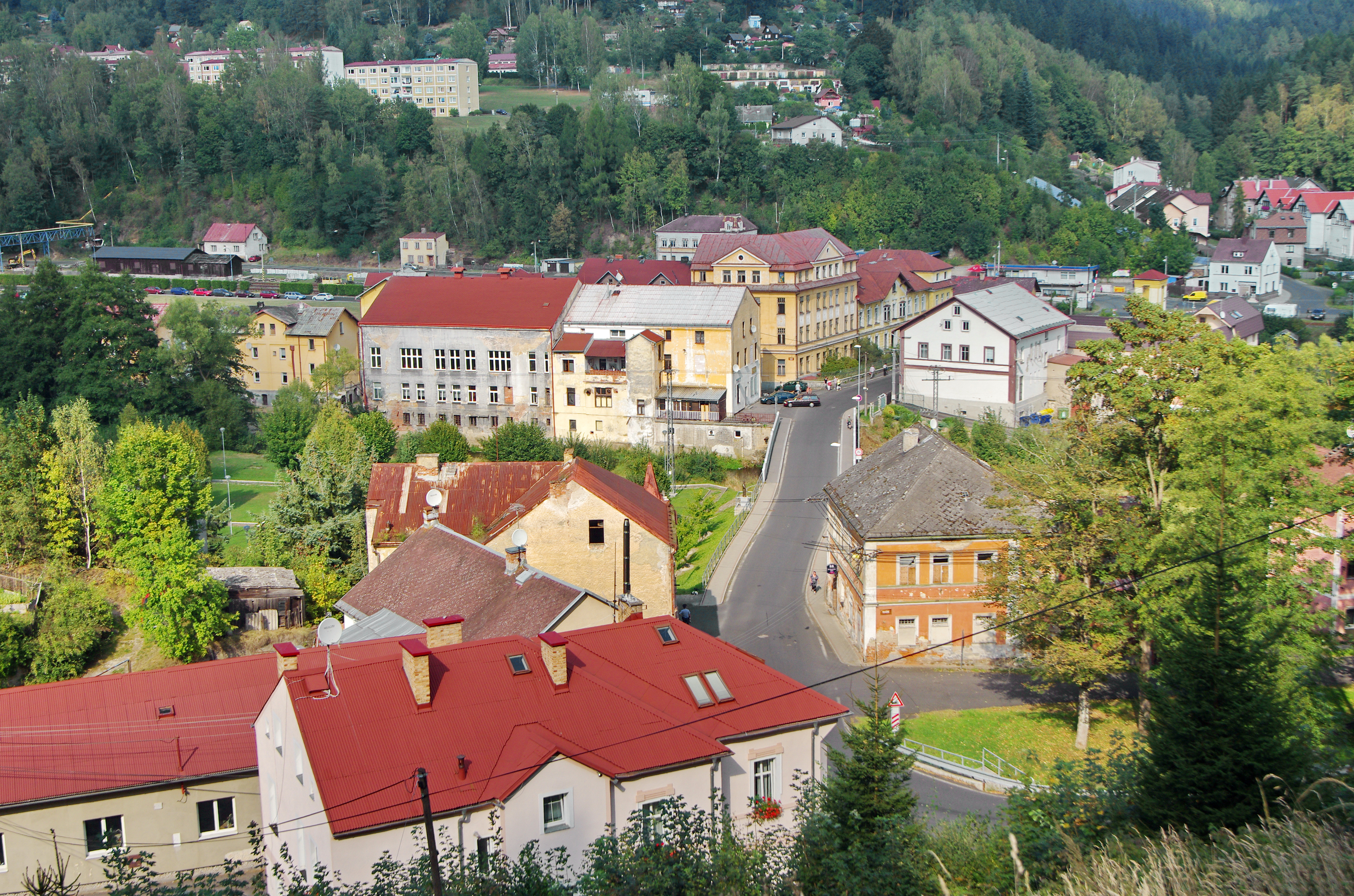 Oloví, město v Krušných horách, okres Sokolov